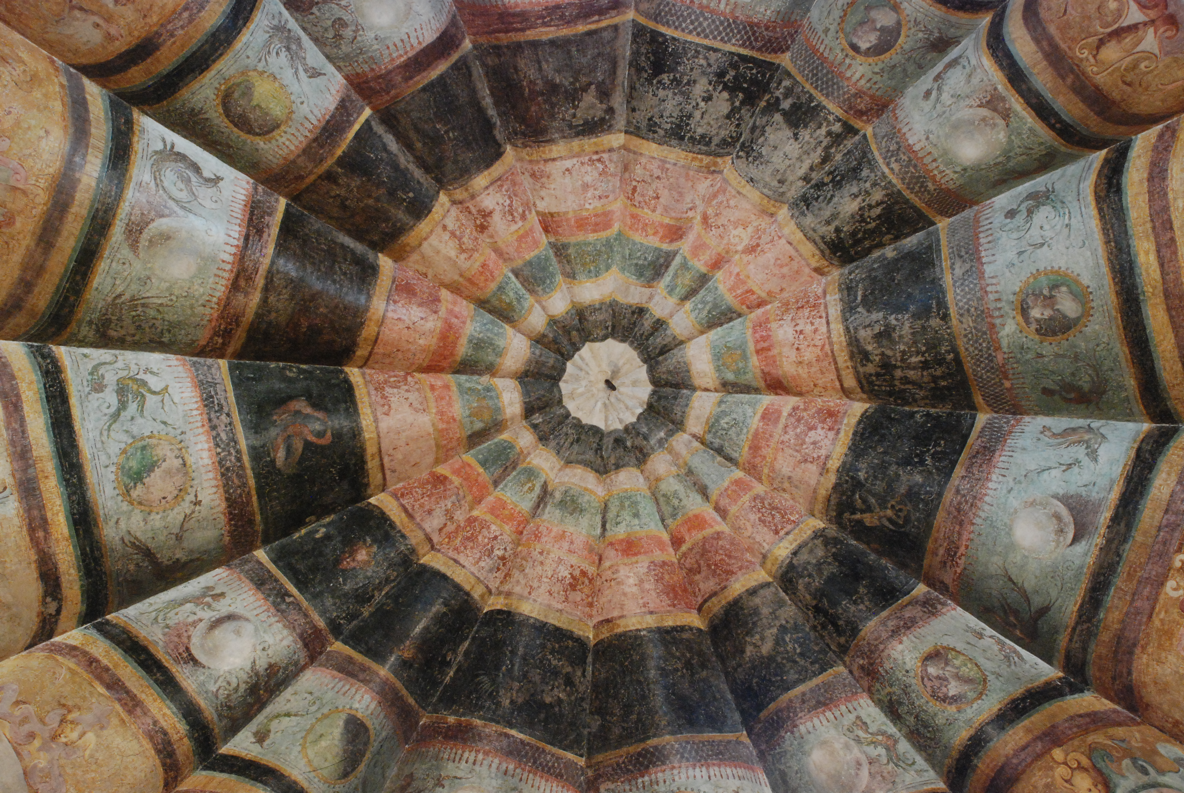 Palazzetto Eucherio Sanvitale soffitto affrescato This is a photo of a monument which is part of cultural heritage of Italy.